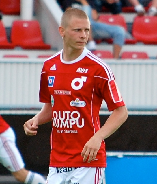 Degerfors IF player Johan Bertilsson.